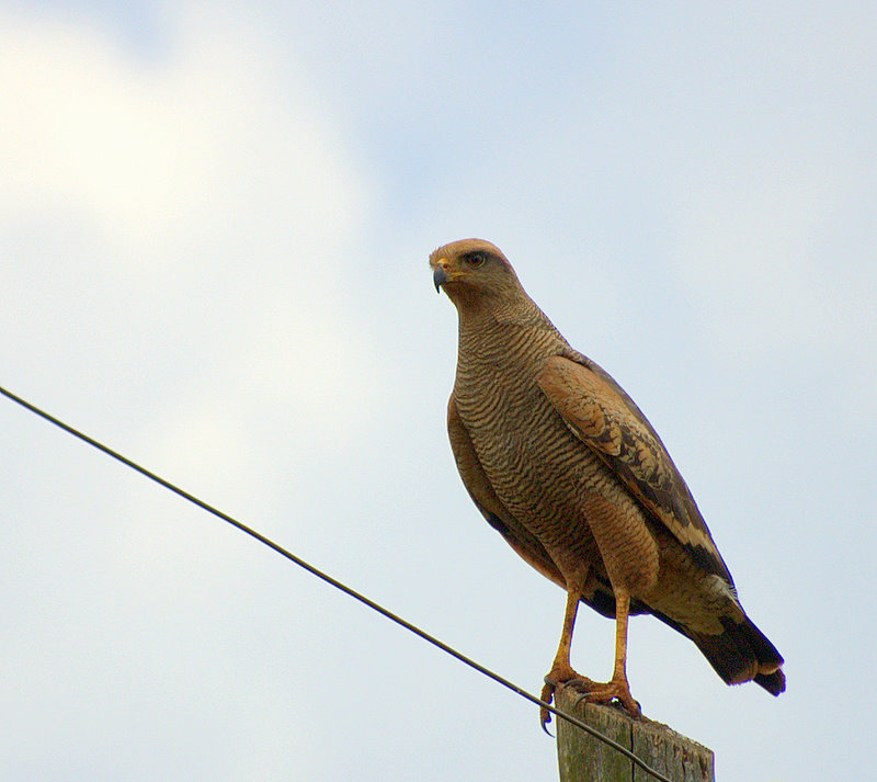 Savanna Hawk (Buteogallus meridionalis) SP 285 rodovia Piraju/Manduri